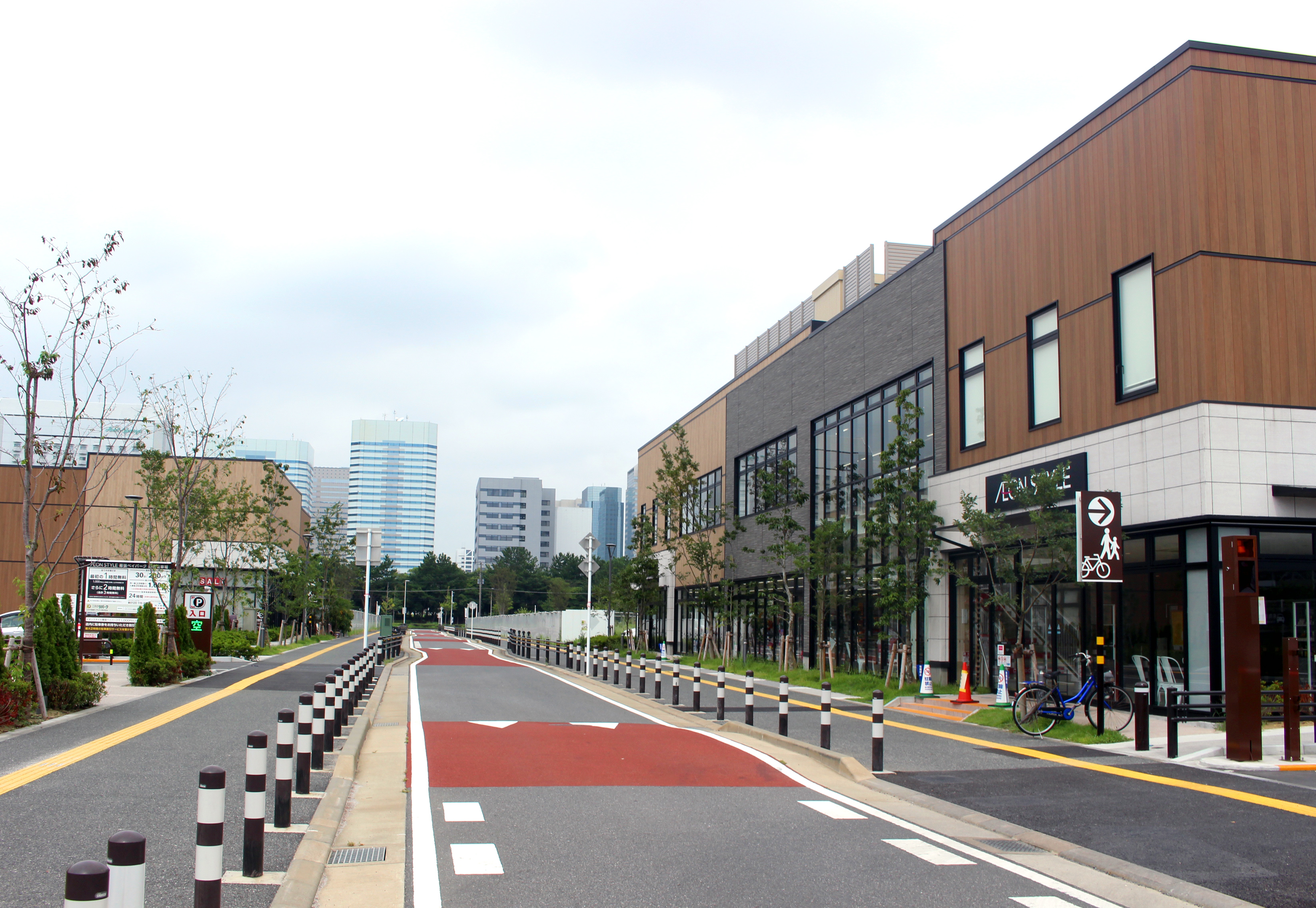 幕張ベイパークにおける減速対策（道路蛇行）